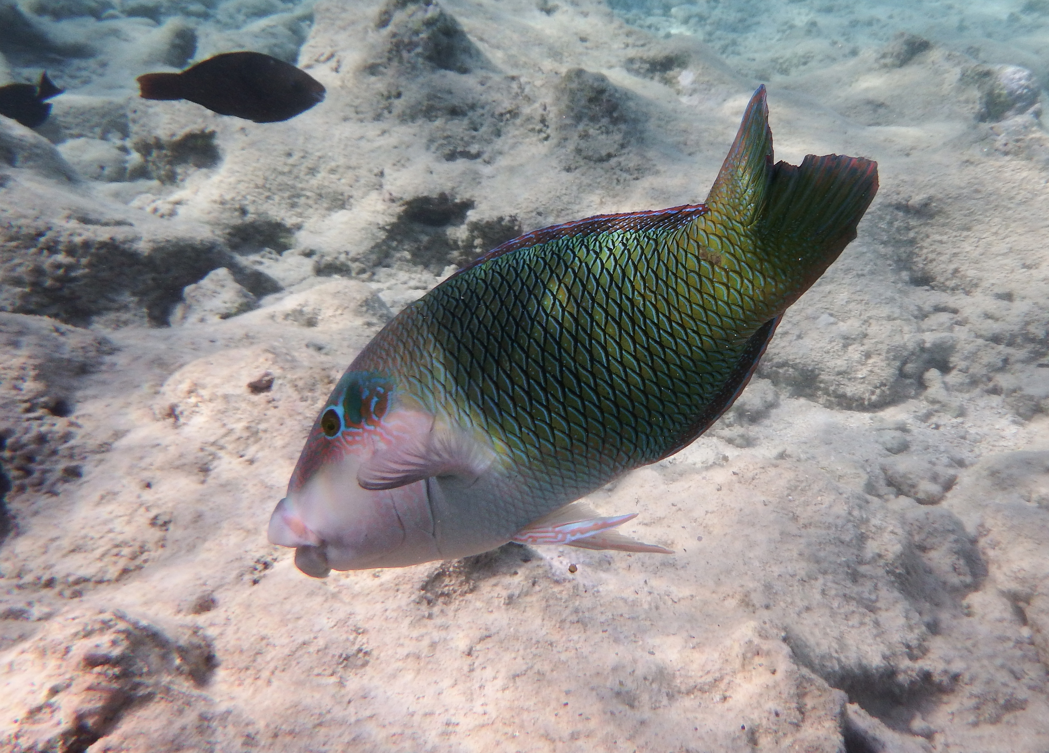 Hemigymnus melapterus. Aufgenommen im Roten Meer in Ägypten, Makadi Bay. Hotel Grand Makadi Hausriff. VIDEO